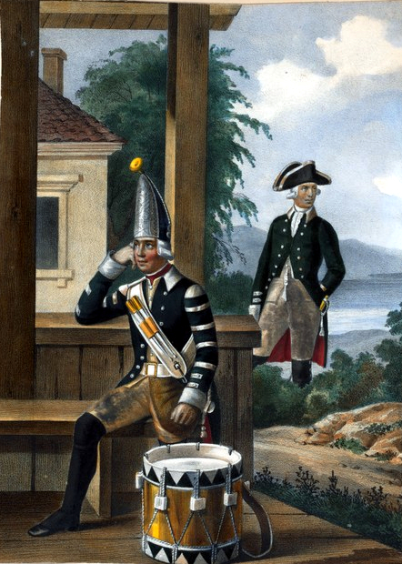 Гренадерский Барабанщик и Обер-офицер Мушкетерского Берха полка. 1798-1801.